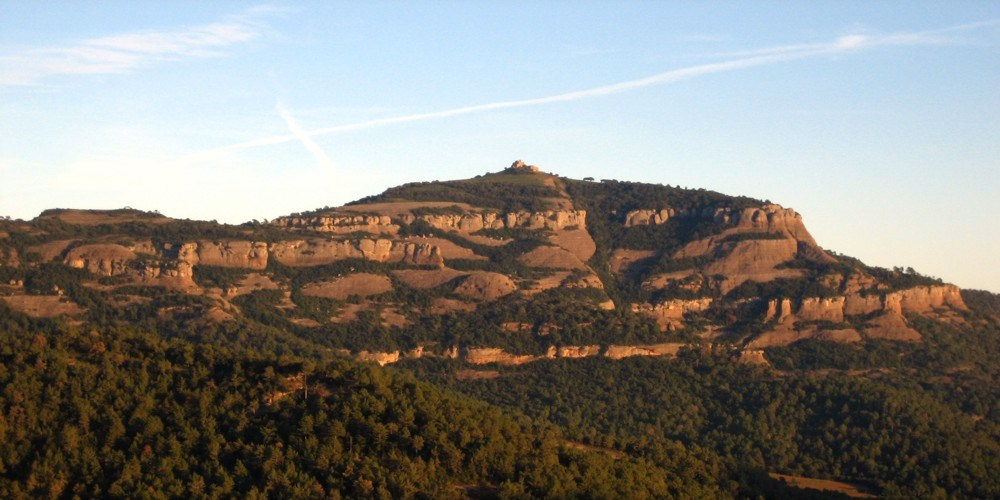 Sant Llorenç del Munt, La Mola, atardecer, capvespre, sunset